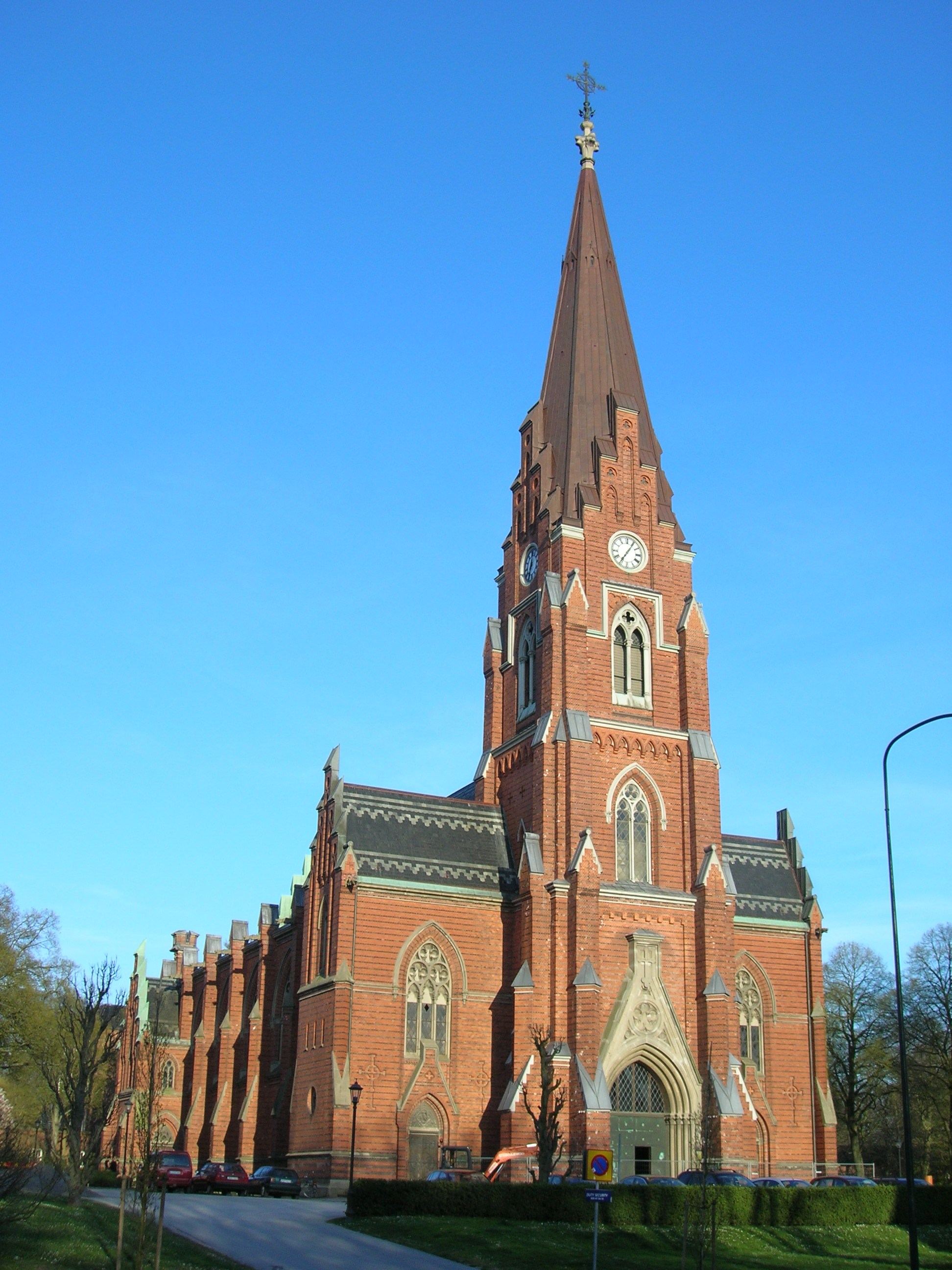 Lunds Allhelgonakyrka